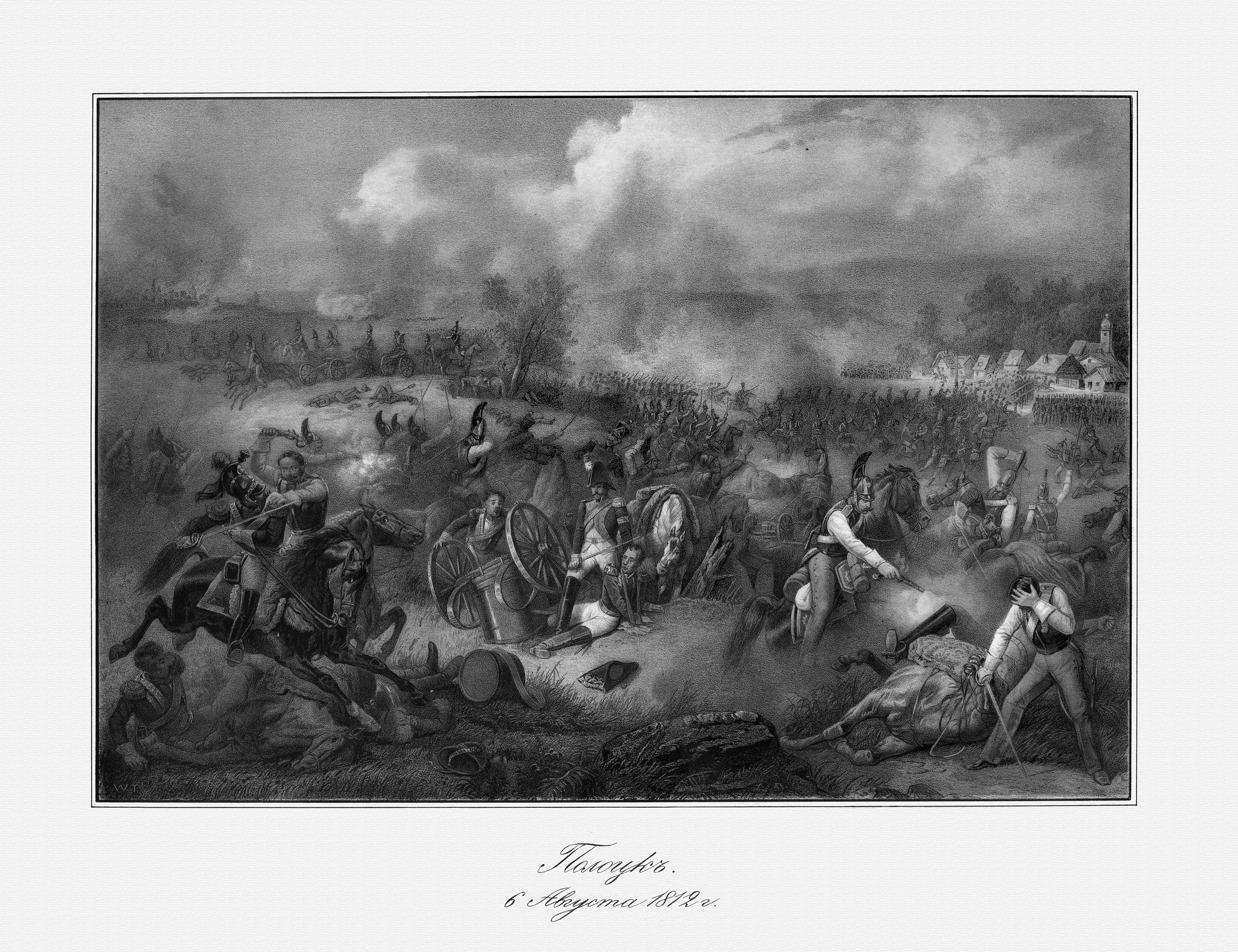 Bataille de Polotsk, 18 aout 1812 (la date inscrite sur la gravure est celle du calendrier julien)